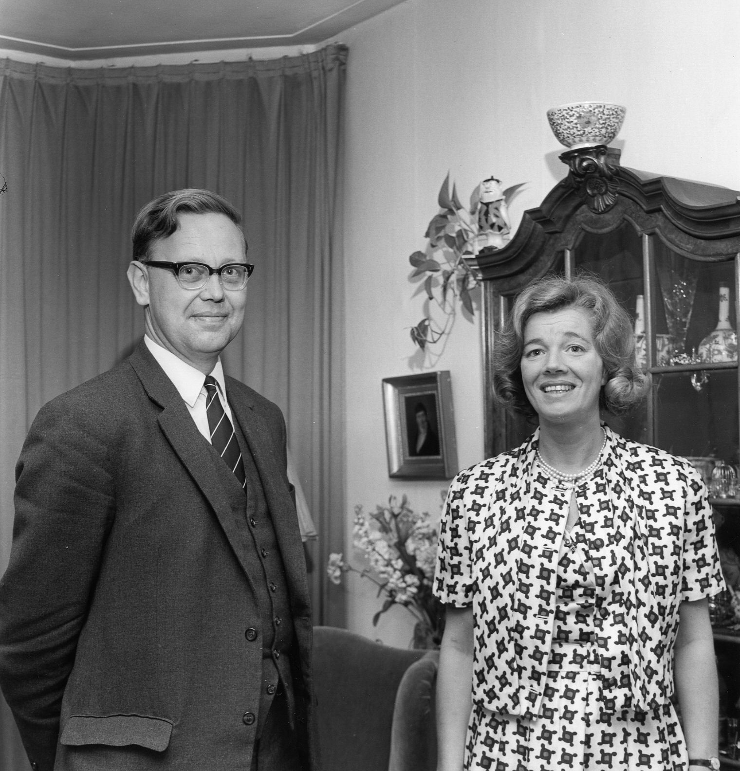 Portret van mr. Albertus baron van Harinxma thoe Slooten en zijn echtgenote, kort na zijn benoeming tot burgemeester van de gemeente Doorn.